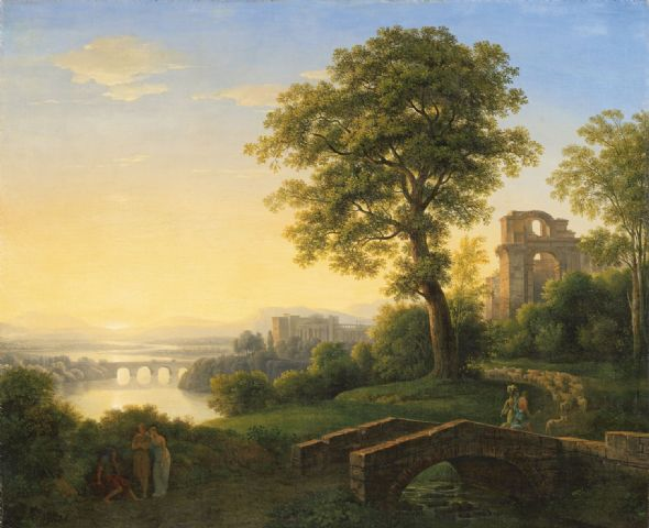 Arkadische Landschaft mit Schloss, Ruine und Brückenlabel QS:Lde,"Arkadische Landschaft mit Schloss, Ruine und Brücken"